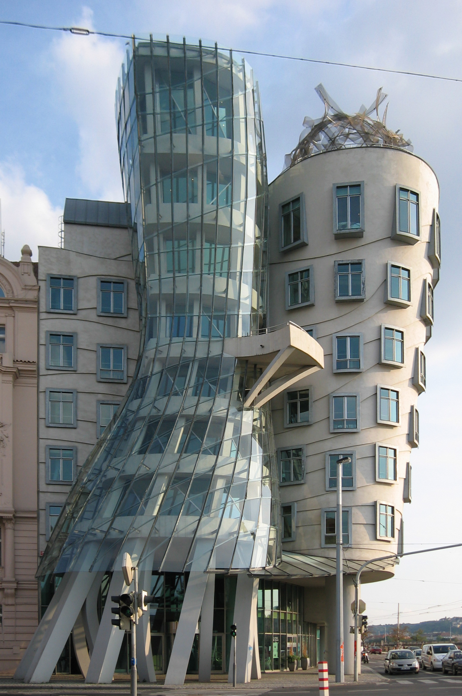 La Casa Danzante, tambíen conocida como Ginger and Fred, en Praga. Diseñada por el gabinete de arquitectos de Frank Gehry y Vlado Milunić.